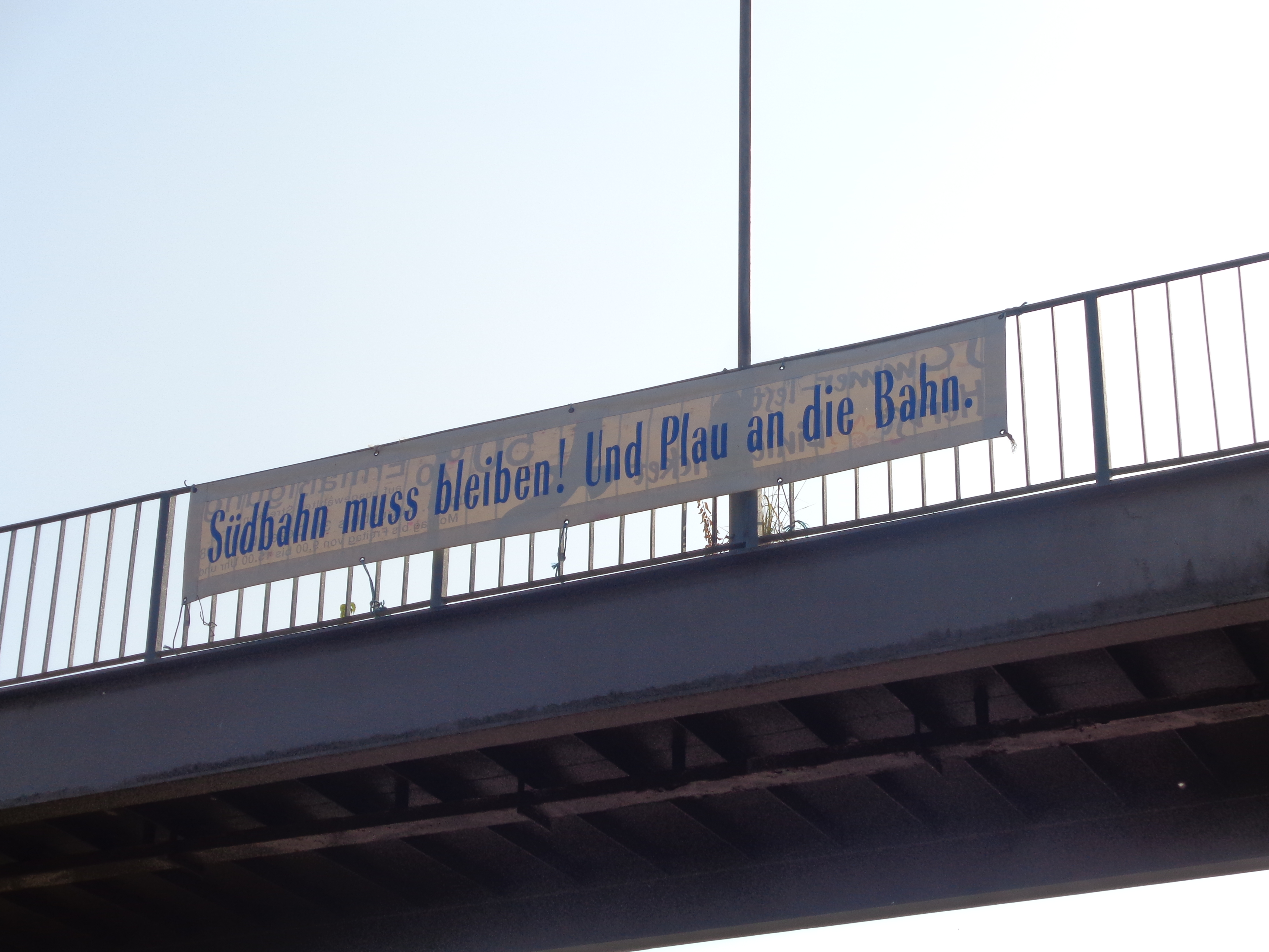 Spruchband zur Erhaltung der Mecklenburgischen Südbahn an der Fußgängerbrücke im Bahnhof Karow